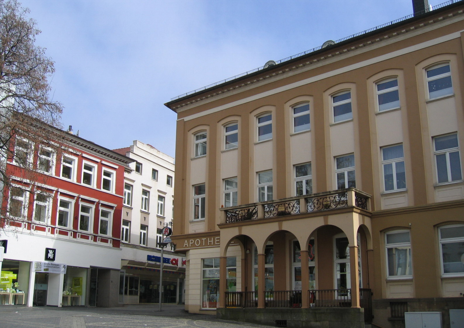 Description: Alter Rathausplatz in Iserlohn. Source: selbst fotografiert Date: 19. März 2006 Author: Asio otus